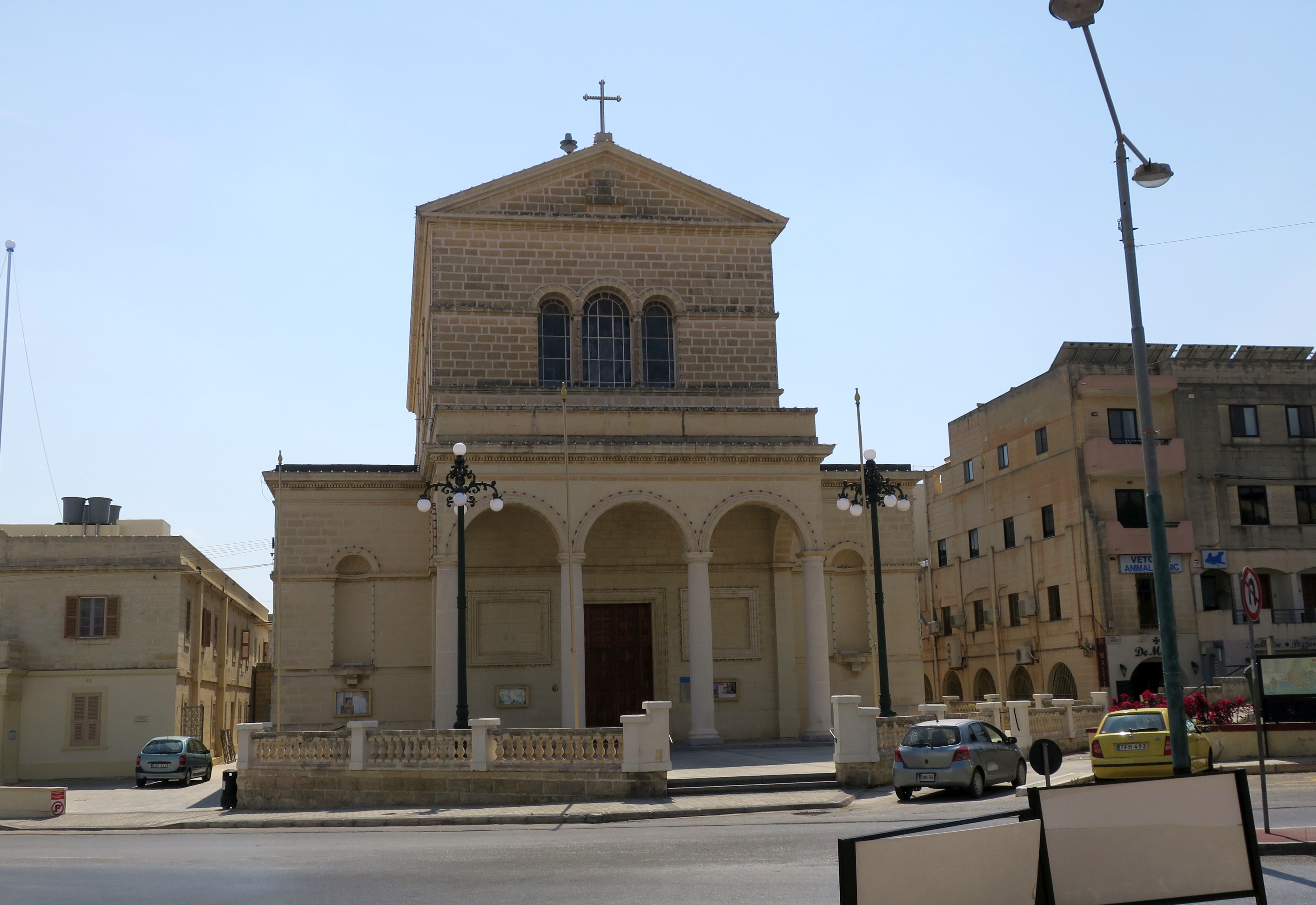 San Gwann Church